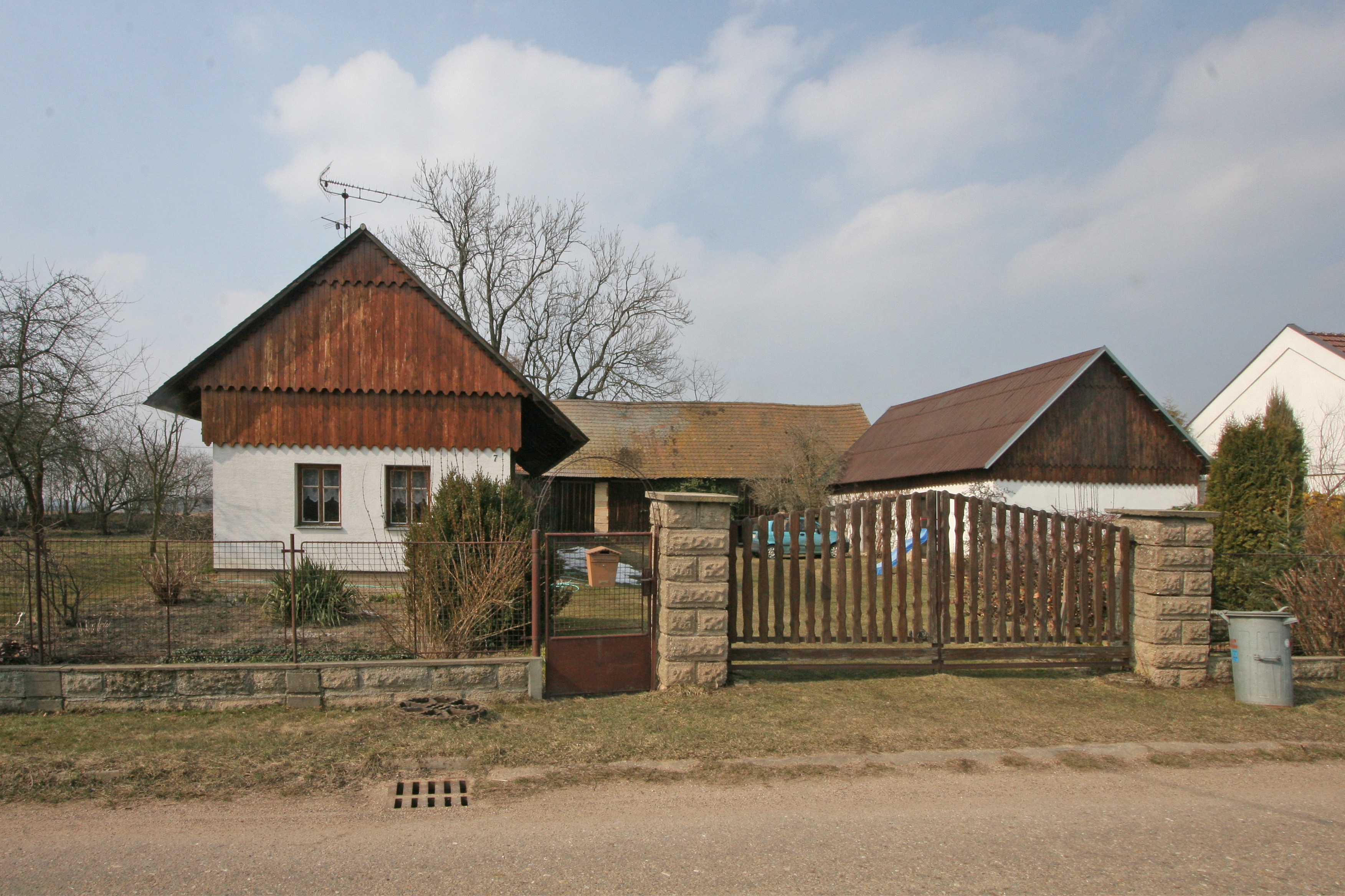 Sobětuš čp. 7